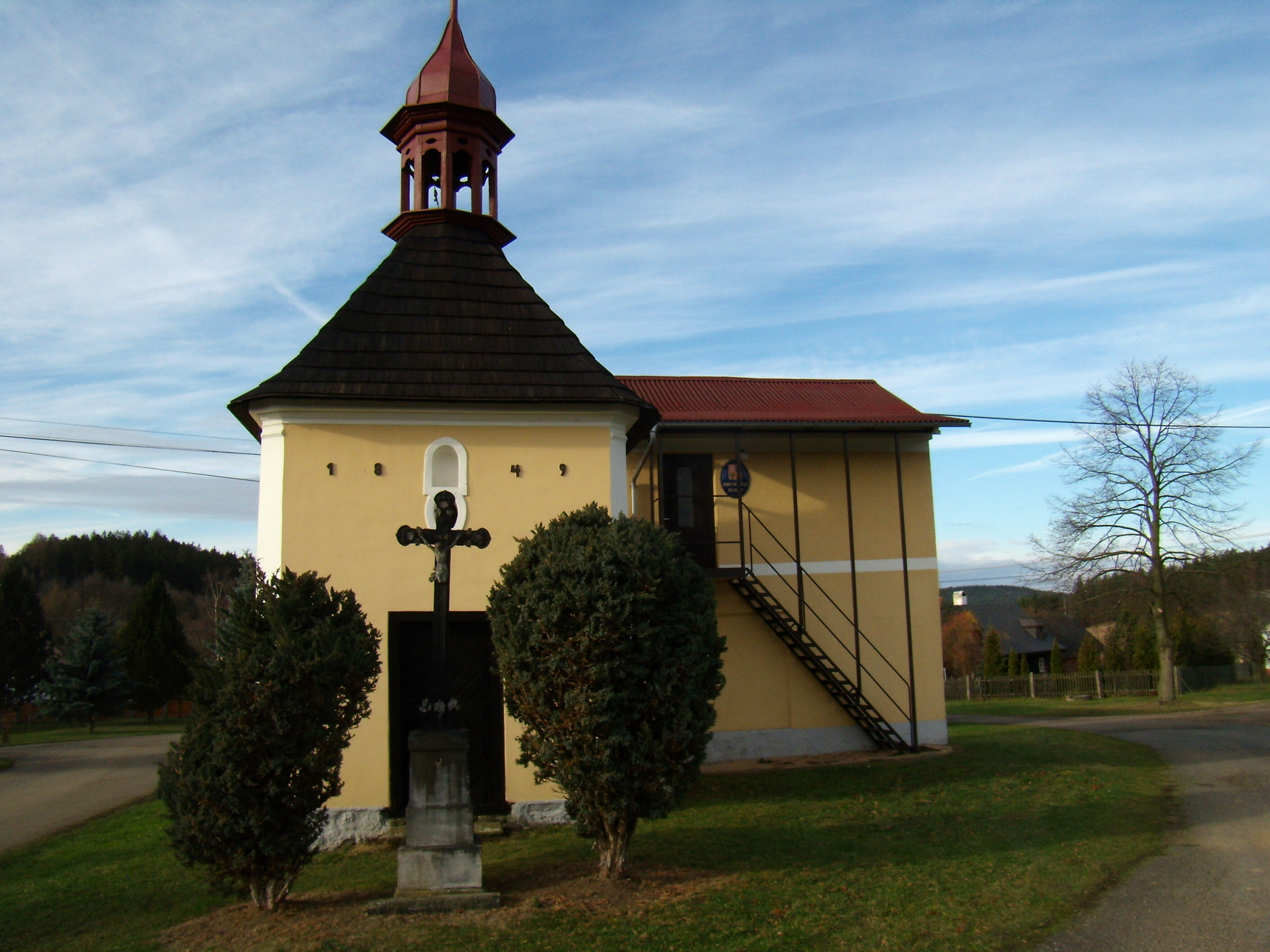 Plískov - kombinace kaple a obecního úřadu